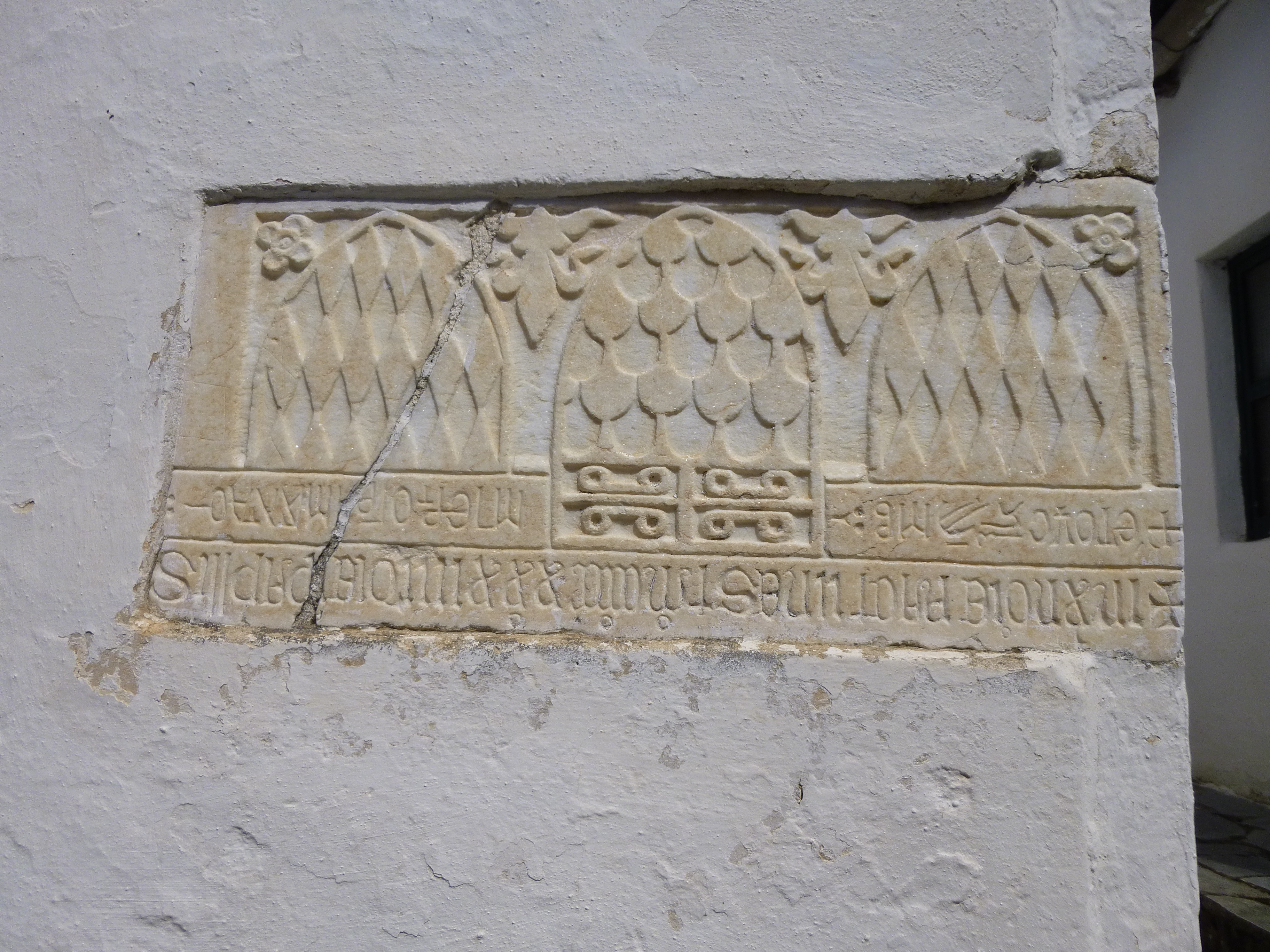 Wappen der Gattelusi an der Kirche des Hl. Anastasios im Bergdorf Kastro auf der griechischen Insel Thassos. Die italienische Adelfamilie hatte Thassos einige Jahre lang beherrscht.